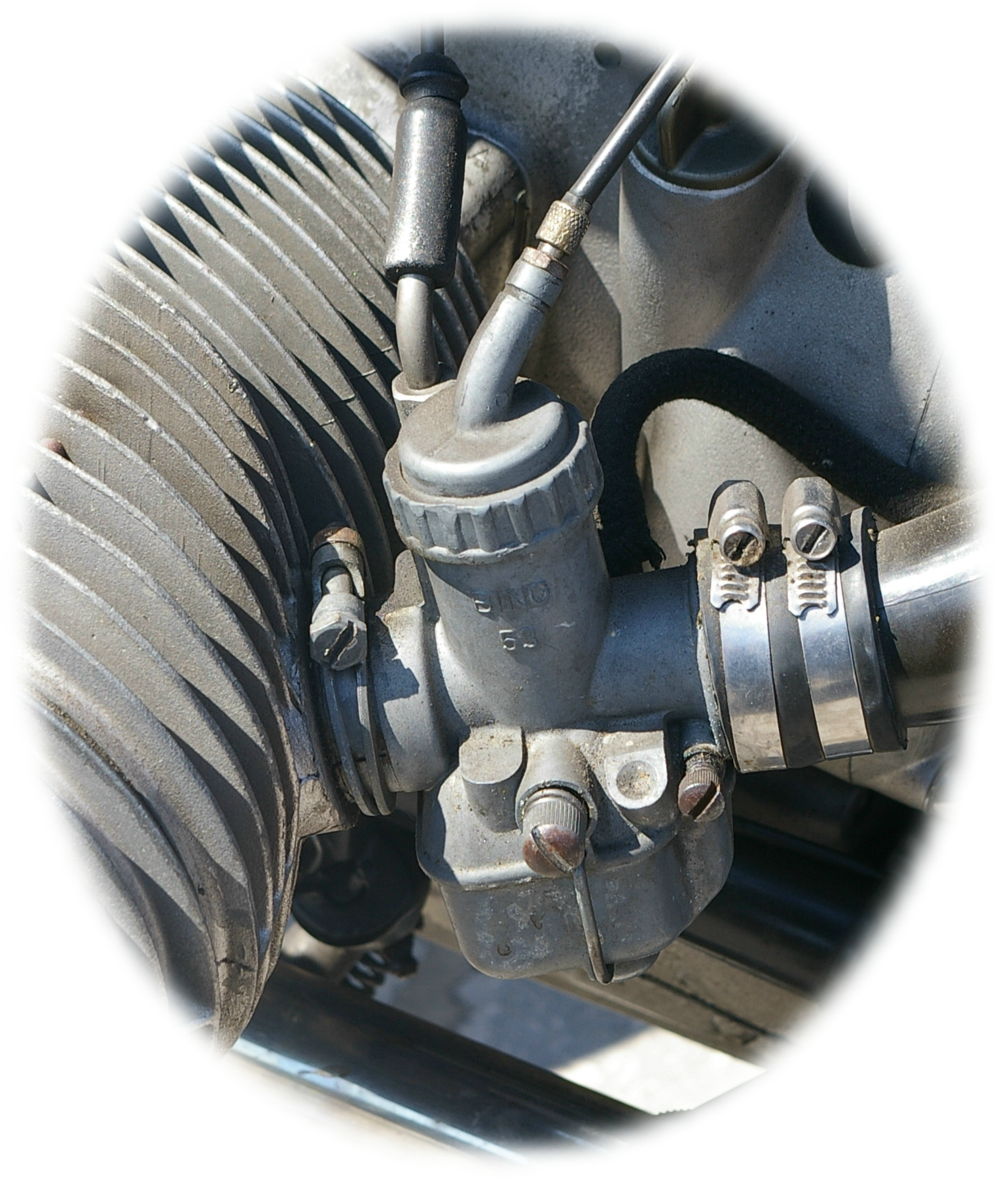 Schieber-Vergaser Bing an BMW R 60/6, DO-Hohensyburg, eigenes Foto vom 09.04.2006, GNU-GFDL-Lizenz, Mailto